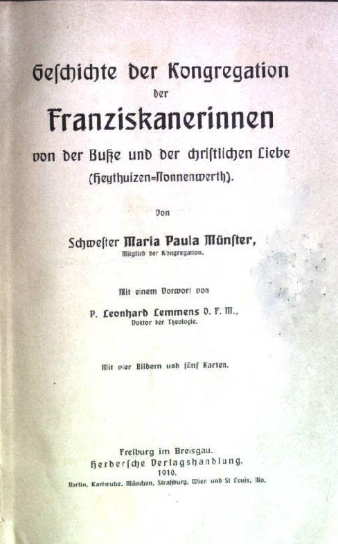 Buch von Sr. Maria Paula Münster